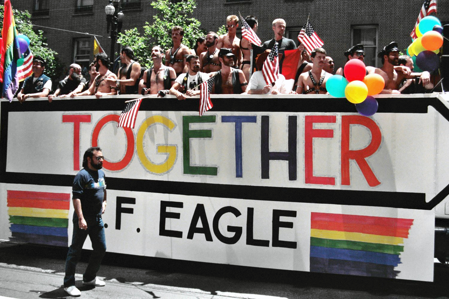 San Francisco, June 1986